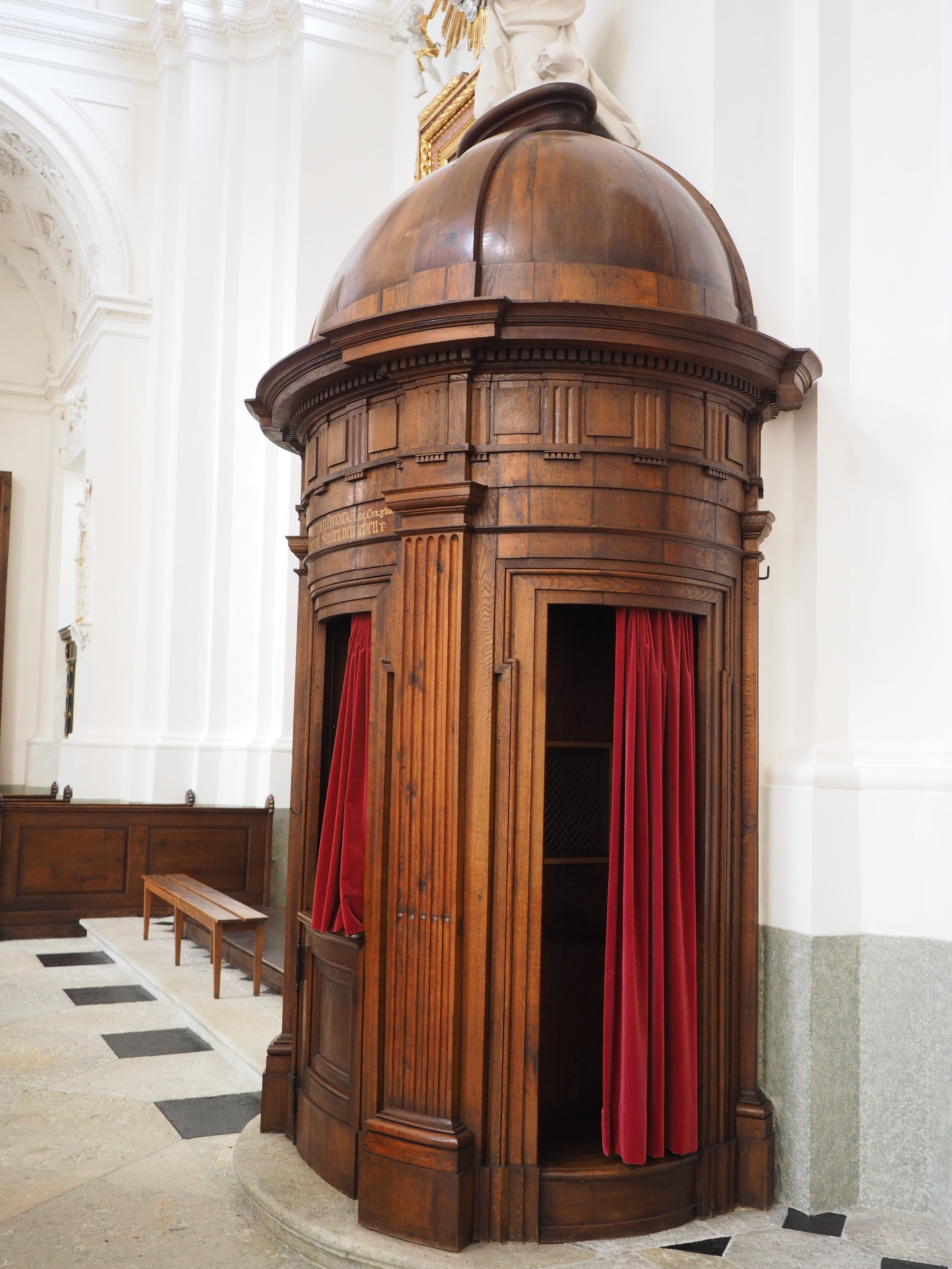 Beichtstuhl Ursenkathedrale Solothurn